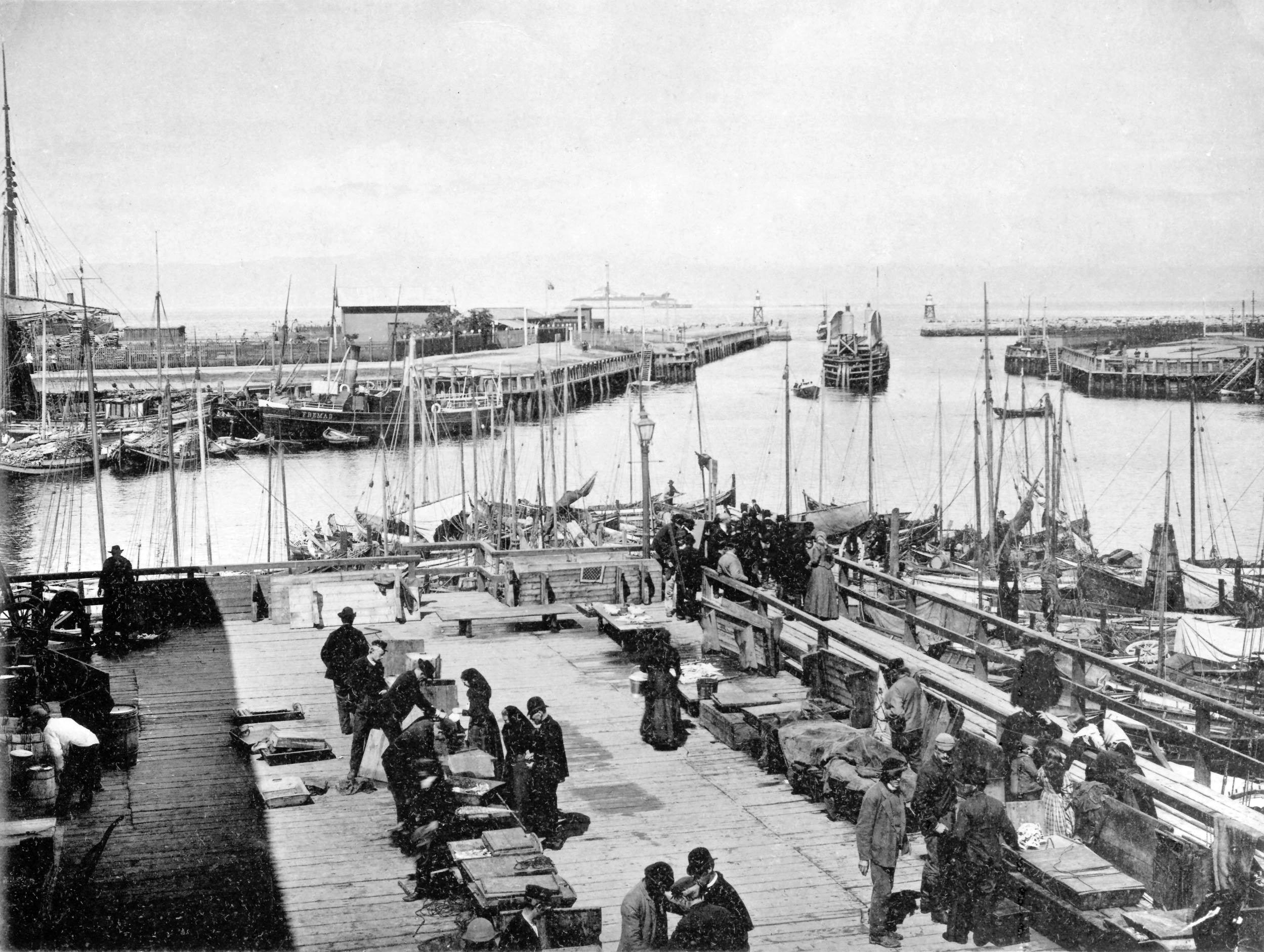 Travel handel på fisketorvet Ravnkloa. Senere ble det bygget tak over plassen, men dette brant ned sammen med Thaulowbryggen i oktober 1944. Byfiskernes båter ligger tett ved kai. Statsingeniør Dahls havne- og jernbaneanlegg sees på den andre siden av kanalen. Meråkerbanen (til høyre) ble innviet i 1882. Svingbrua mellom Meråkerbanen og Støren-/Rørosbanen er åpnet p.g.a. båttrafikk. Taubåten Fremad ligger til kai. Foto: Wilhelm Dreesen